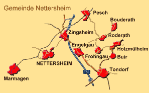 Orrtsteilkarte der Gemeinde Nettersheim